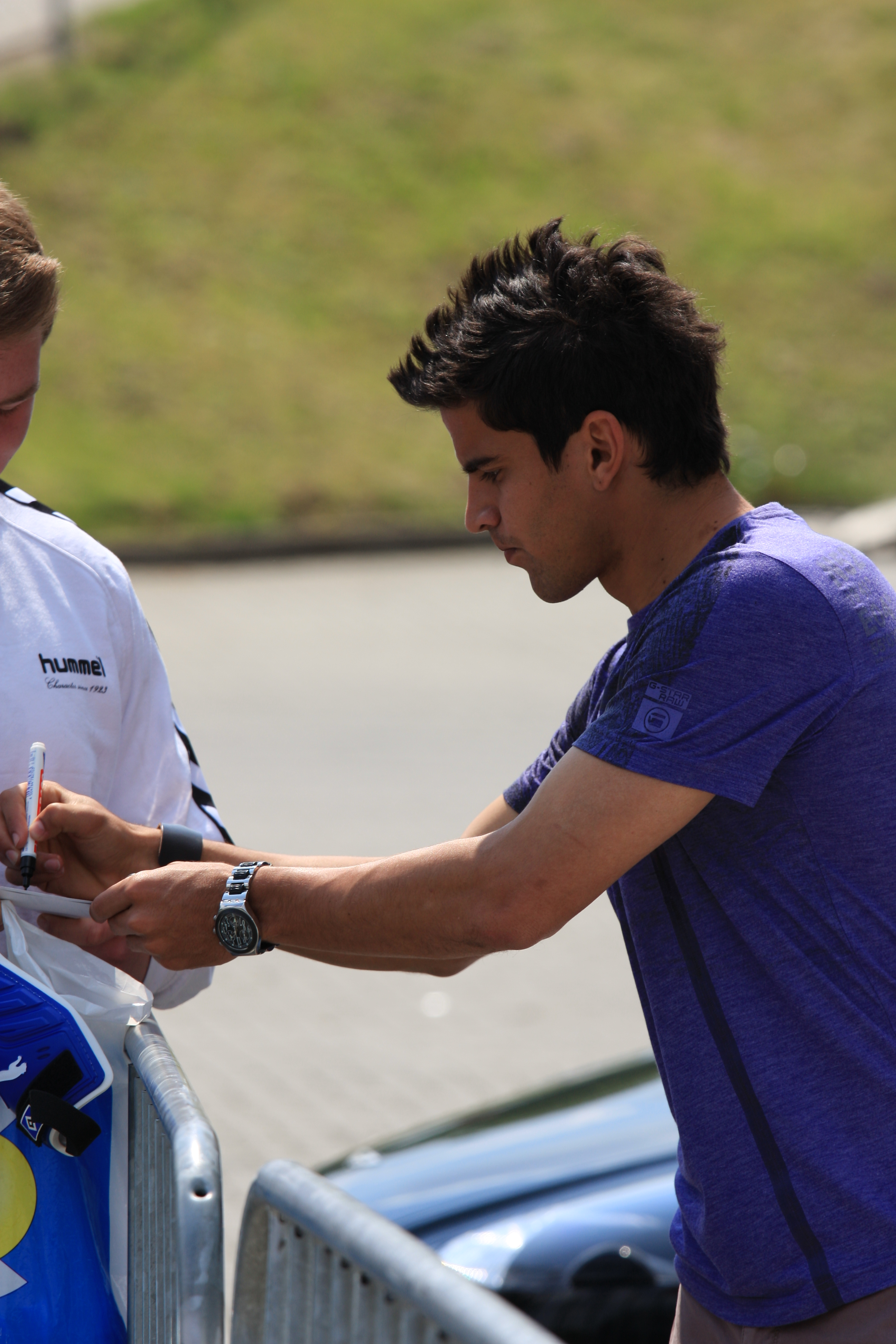 Tomás Rincón am Tag nach dem letzten Spieltag der Saison 2008/2009 an der HSH-Nordbank Arena.